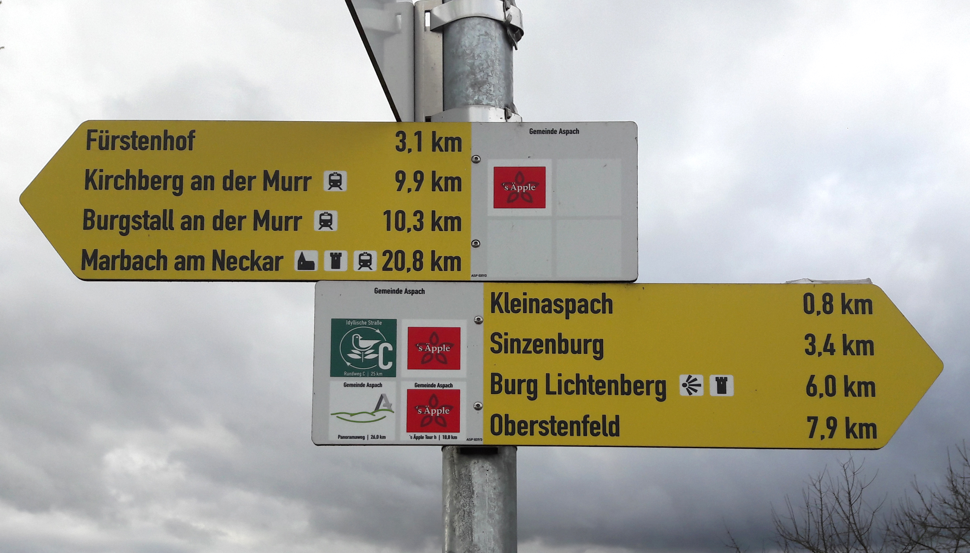 Wanderwegsweiser in der Gemeinde Aspach